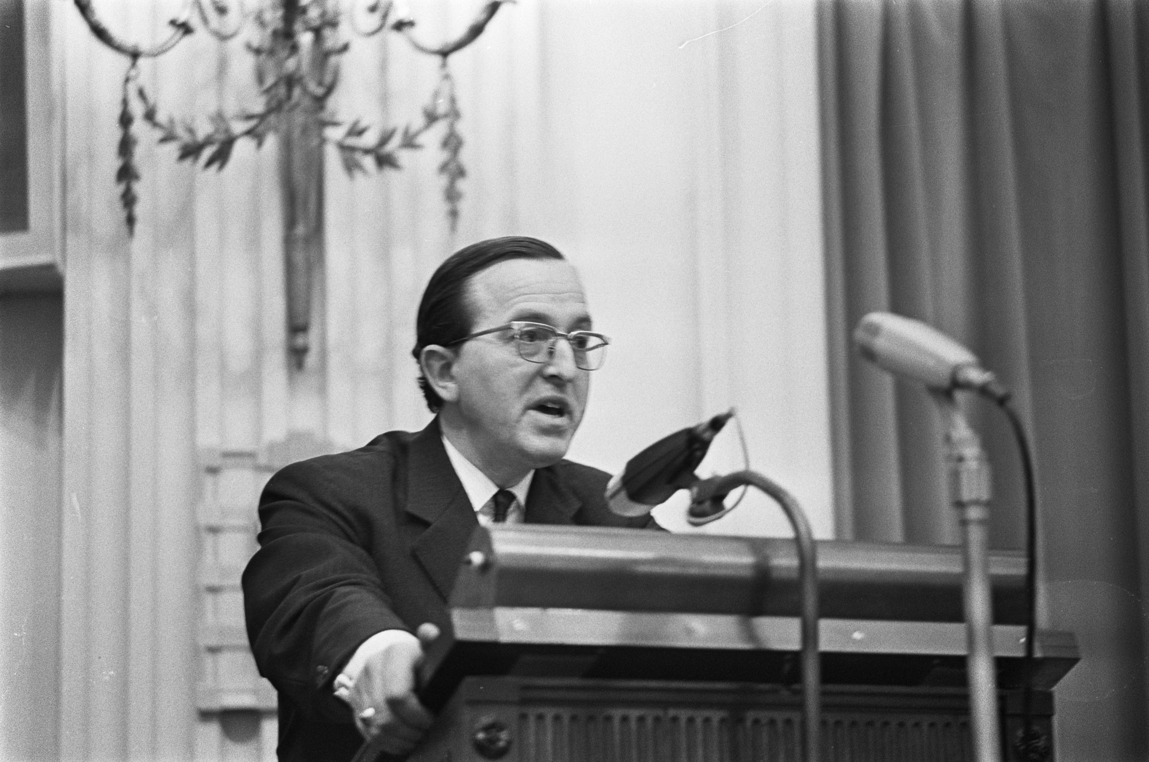 Collectie / Archief : Fotocollectie Anefo Reportage / Serie : [ onbekend ] Beschrijving : Afsplitsing van de Radicalen uit de KVP-fractie; verklaring van kamerlid Jacques Aarden als fractievoorzitter van de nieuwe Groep-Aarden in de Tweede Kamer Datum : 27 februari 1968 Locatie : Den Haag, Zuid-Holland Trefwoorden : parlementariër, politiek, politieke partijen Persoonsnaam : Aarden, J.M. Instellingsnaam : Tweede Kamer Fotograaf : Nijs, Jac. de / Anefo Auteursrechthebbende : Nationaal Archief Materiaalsoort : Negatief (zwart/wit) Nummer archiefinventaris : bekijk toegang 2.24.01.05 Bestanddeelnummer : 921-1175